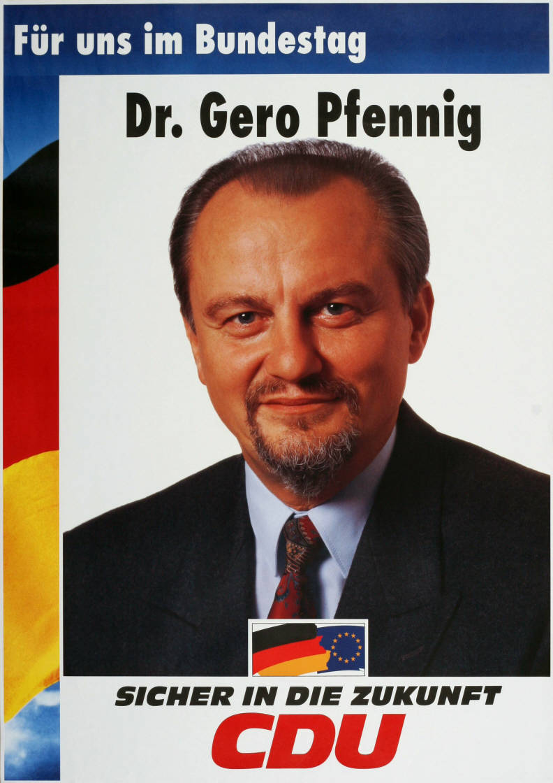 Für uns im Bundestag Dr. Gero Pfennig Sicher in die Zukunft CDU Abbildung: Porträtfoto - Nationalfarben Plakatart: Kandidaten-/Personenplakat mit Porträt Objekt-Signatur: 10-001: 4010 Bestand: Plakate zu Bundestagswahlen (10-001) GliederungBestand10-18: Plakate zu Bundestagswahlen (10-001) » Die 13. Bundestagswahl am 16. Oktober 1994 » CDU » Mit Porträtfoto Lizenz: KAS/ACDP 10-001: 4010 CC-BY-SA 3.0 DE